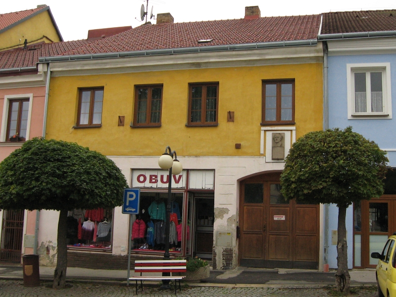 Městský dům - rodný dům V. Nováka, nám. Čsl. armády 55, Kamenice nad Lipou, Kamenice nad Lipou.